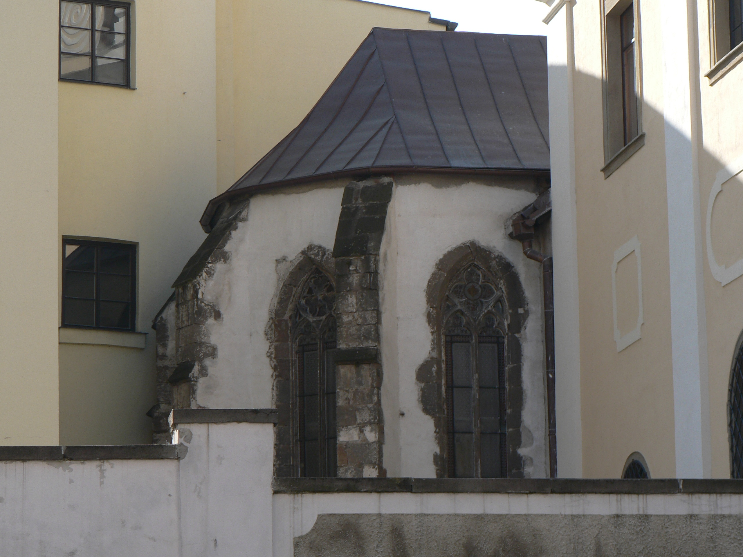 Olomouc, kostel sv. Michala, kaple sv. Alexia